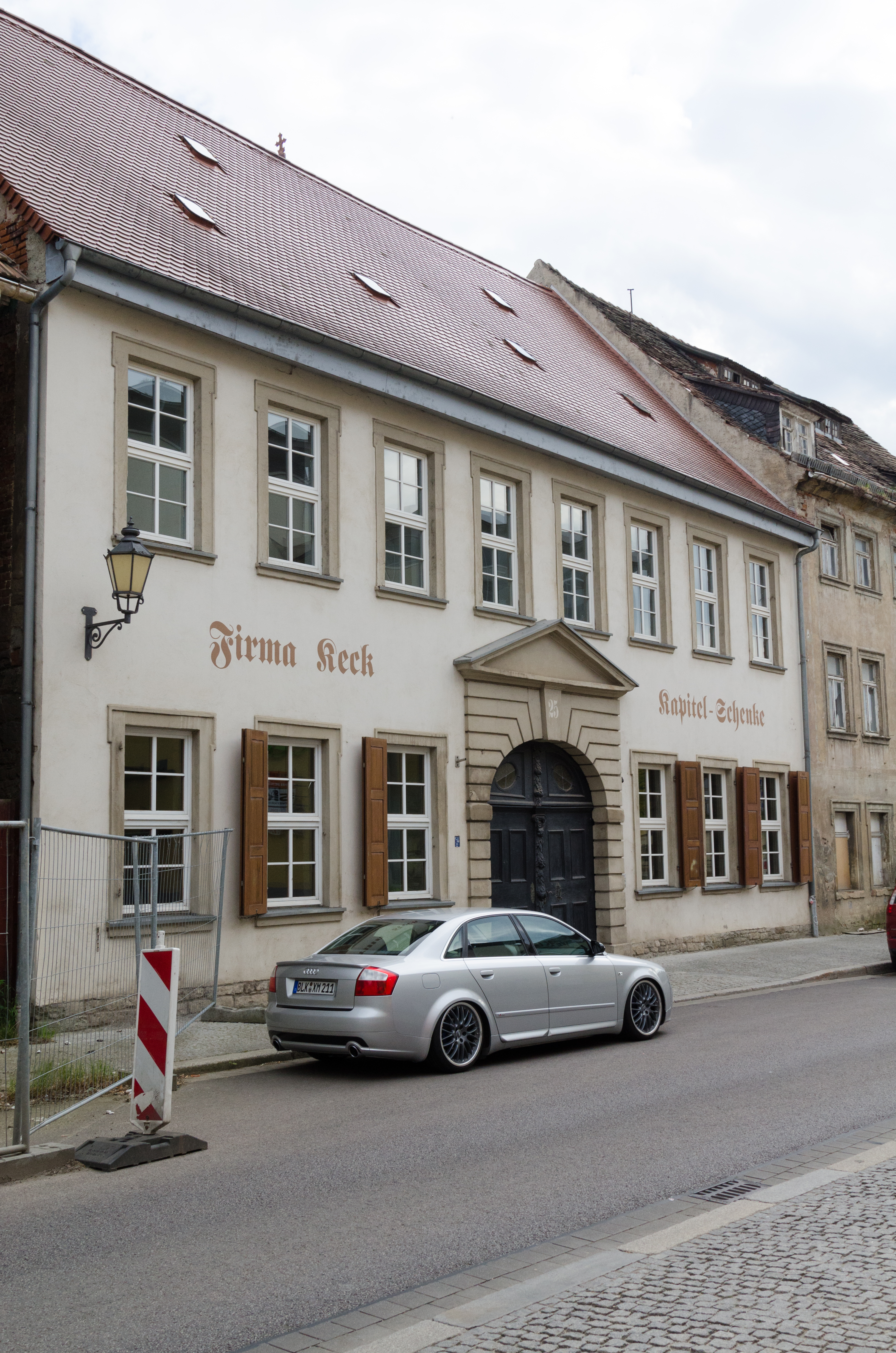 Zeitz, Brühl 25